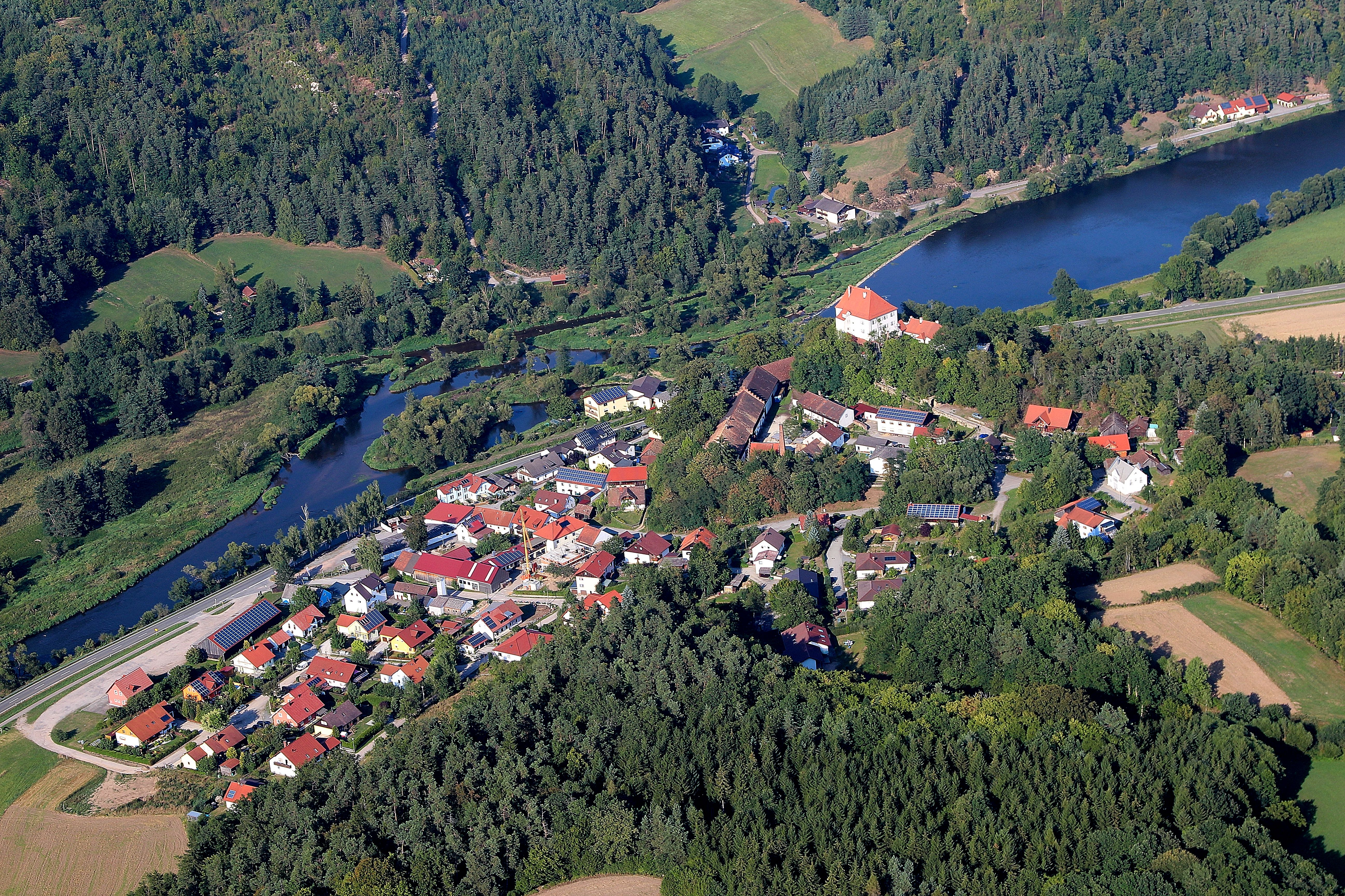 Stefling ist ein Ortsteil von Nittenau, Landkreis Schwandorf, Oberpfalz, Bayern